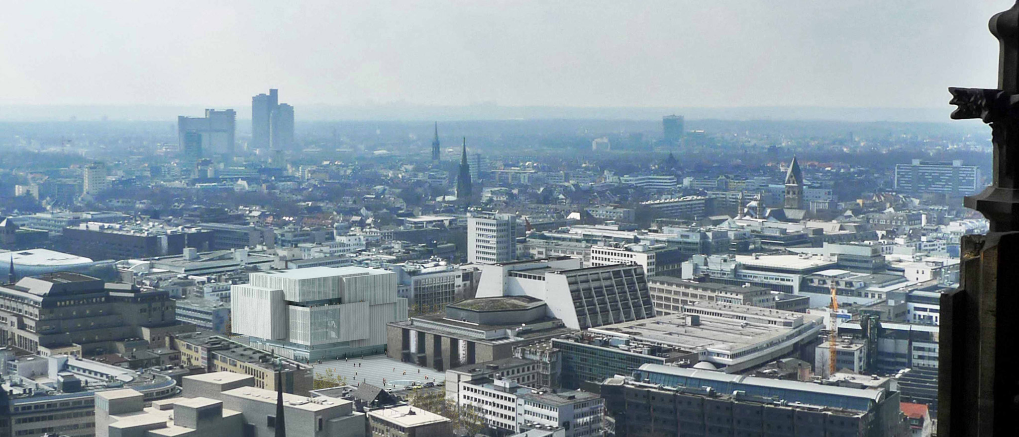 Visualisierung „Bühnen der Stadt Köln“, Wettbewerb 2010